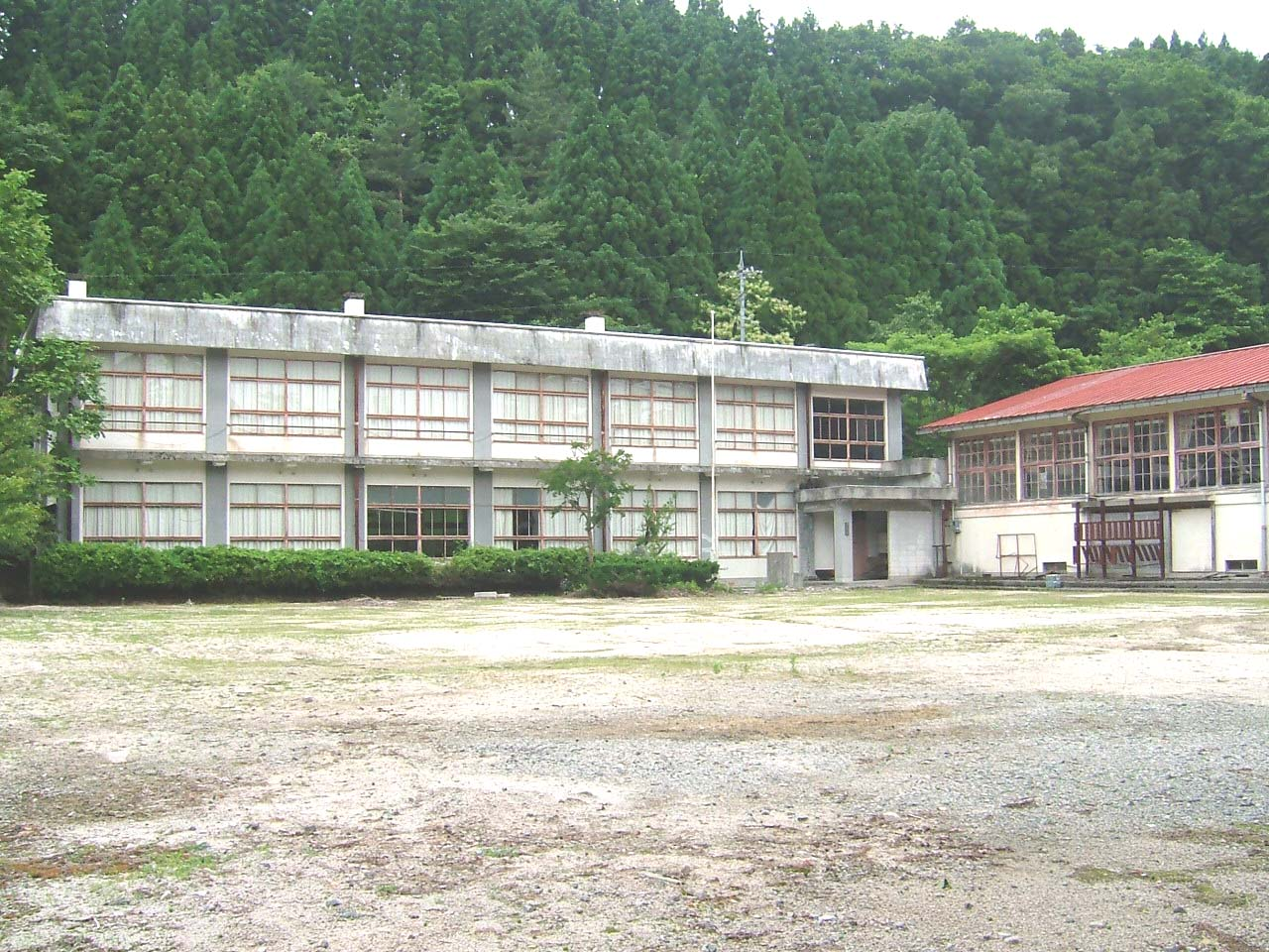 伯耆町立日光小学校旧校舎